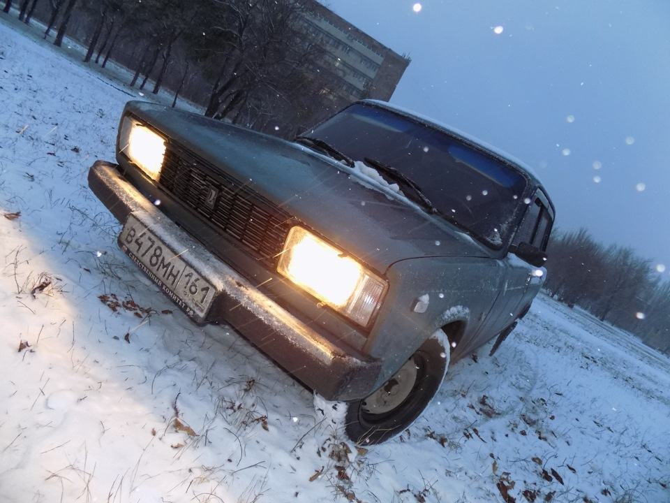 ВАЗ 21053 "Жигули" выпуска после 1997-го года.